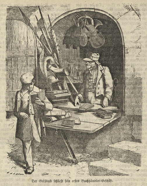 «Der Geißbub schließt sein erstes Buchhändler-Geschäft» – Jakob Joseph Matthys kauft Broeders lateinische Grammatik (Abbildung im St. Ursenkalender 1872)